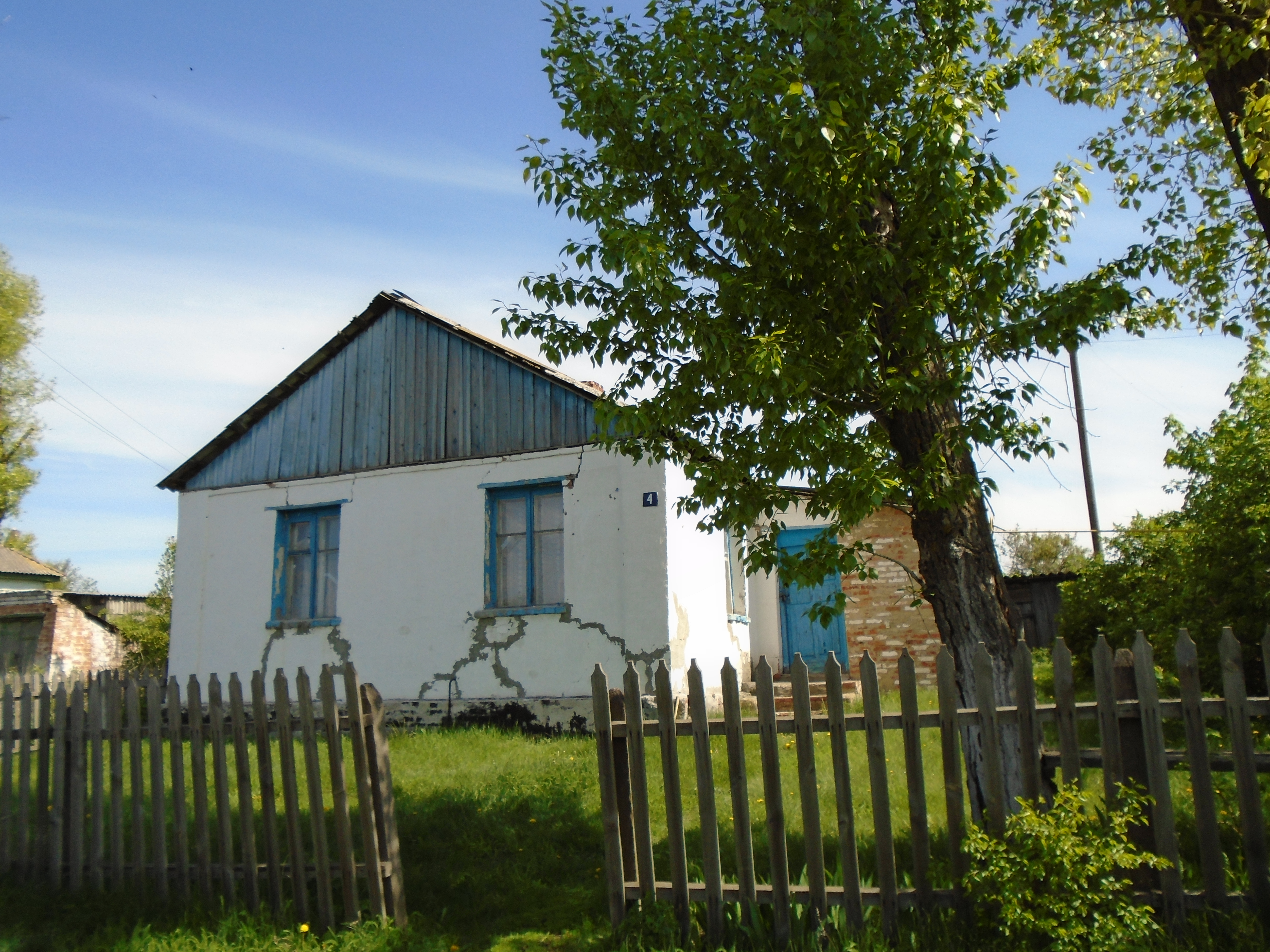 Амбулаторія загальної практики сімейної медицини села Троїцьке Шевченківської центральної районної лікарні (фронтальний вид)